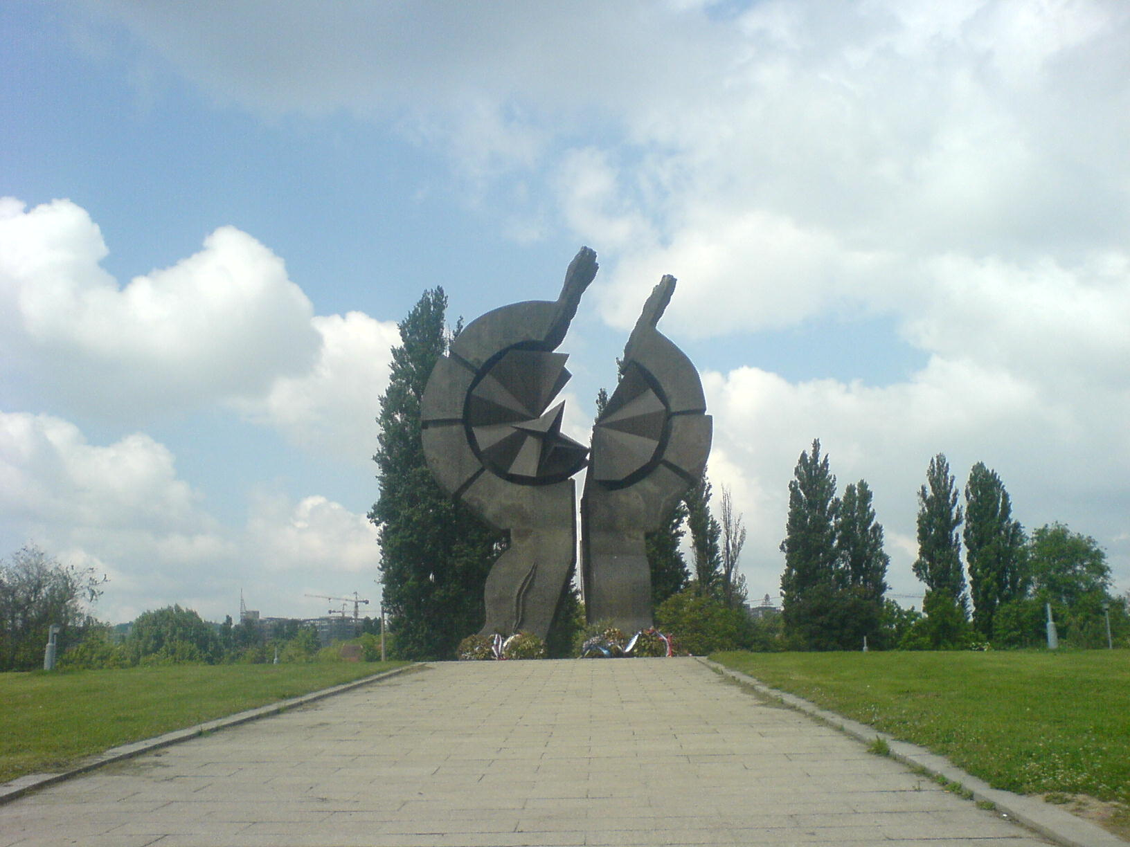 Spomenik na Sajmištu